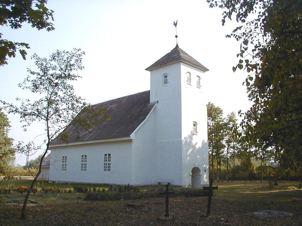 Nīgrandes baznīca. 2002-08-25